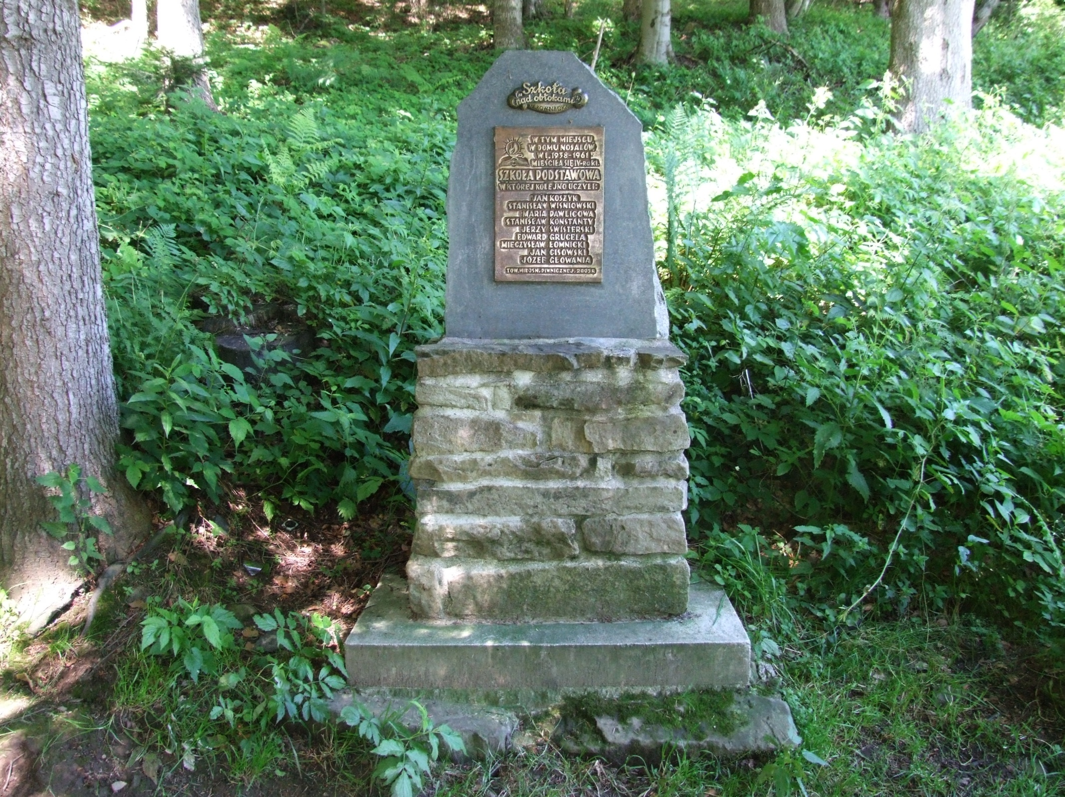 Pomnik na miejscu dawnej szkoły na Niemcowej